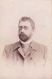 Otakar Georgius Paroubek (1856 - 1909), Český spisovatel, kartograf, dramatik a cestovatel.